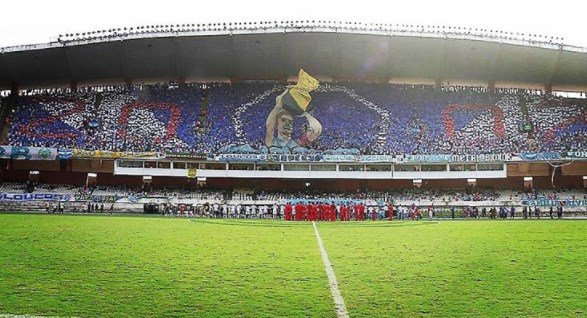 famoso pelo time do pará, o paysandu fez mais uma em homenagem ao título do Campeão dos Campeões de 2002.